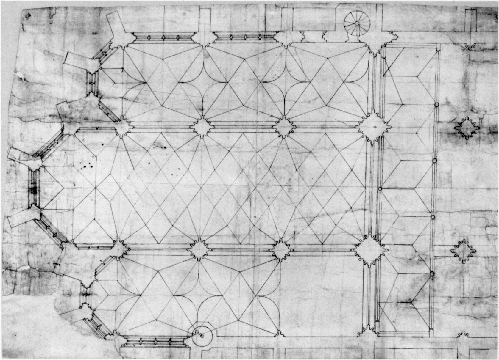 Grundriss der Steyrer Stadtpfarrkirche. Eine der erhaltenen Originalvisierungen Hans Puchspaums in der Wiener Akademie der Bildenden Künste